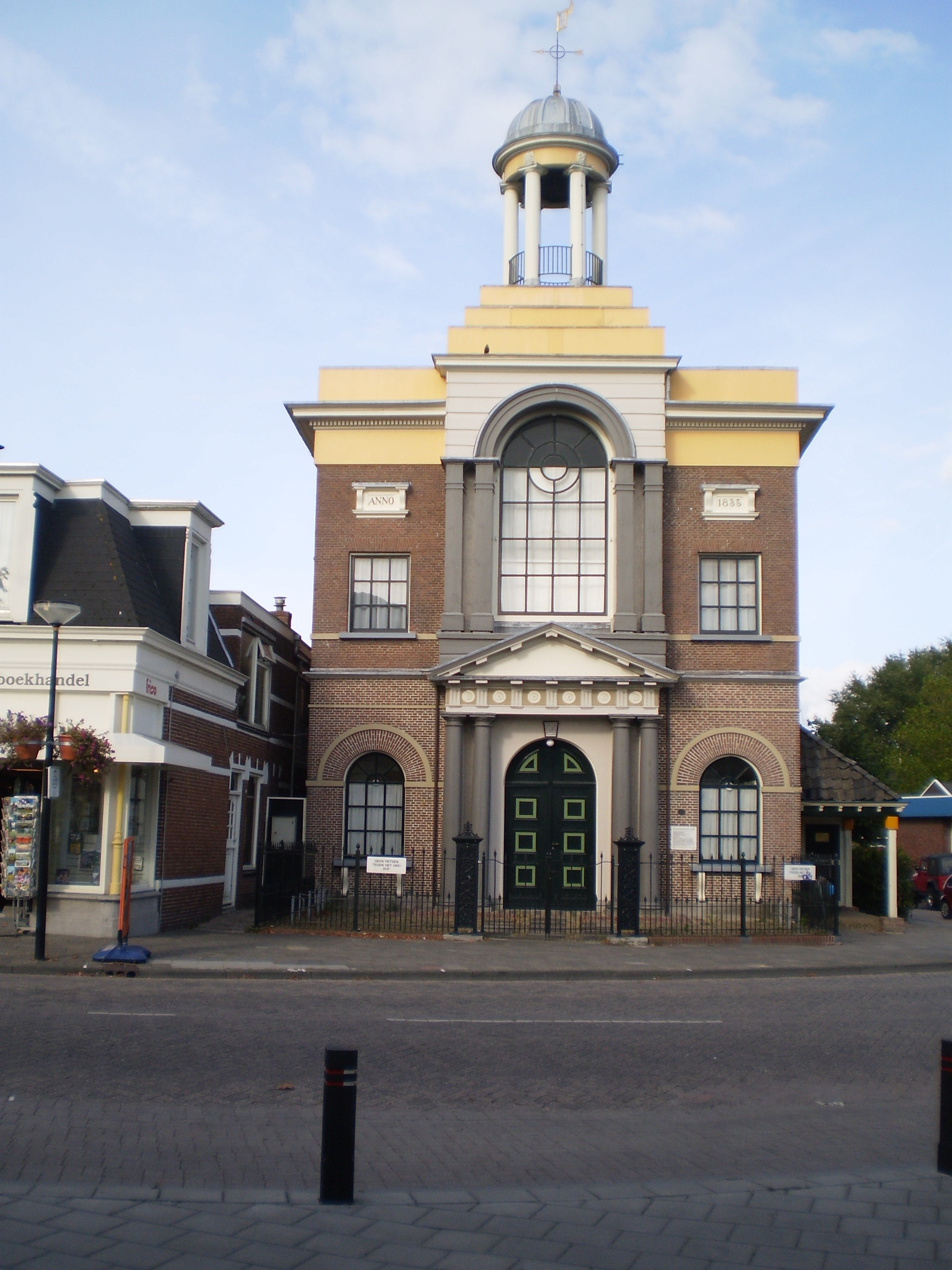 Fermanje fan Akkrum